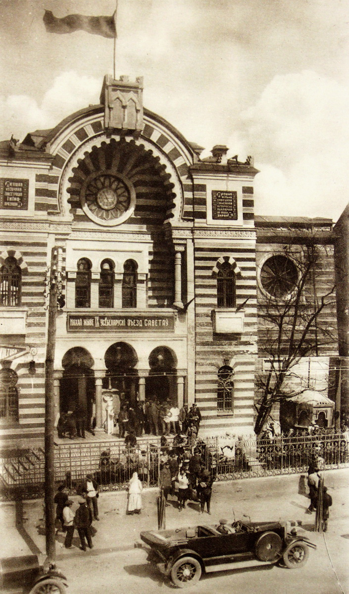 Кінатэатр "Культура" для афіцыйных мерапрыемстваўБеларуская (тарашкевіца): Менск (Miensk), Харальная сынагога, пераробленая пад кінатэатар Культура